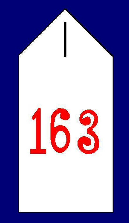 Schulterklappe des Schleswig-Holsteinischen Infanterie-Regiments Nr. 163.